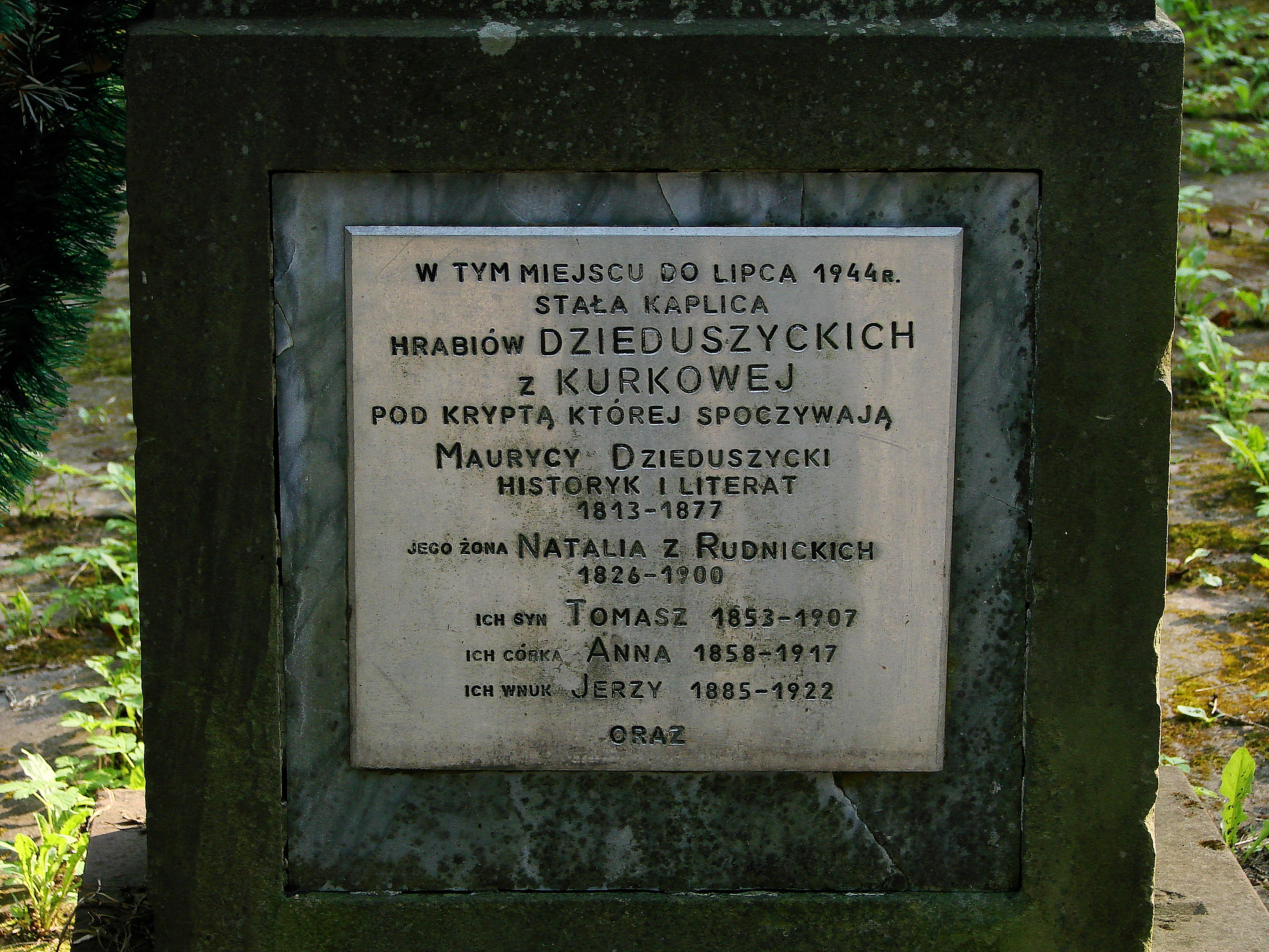 Пам'ятна таблиця на місці каплиці Дідушишицьких. Личаківський цвинтар , поле № 72.